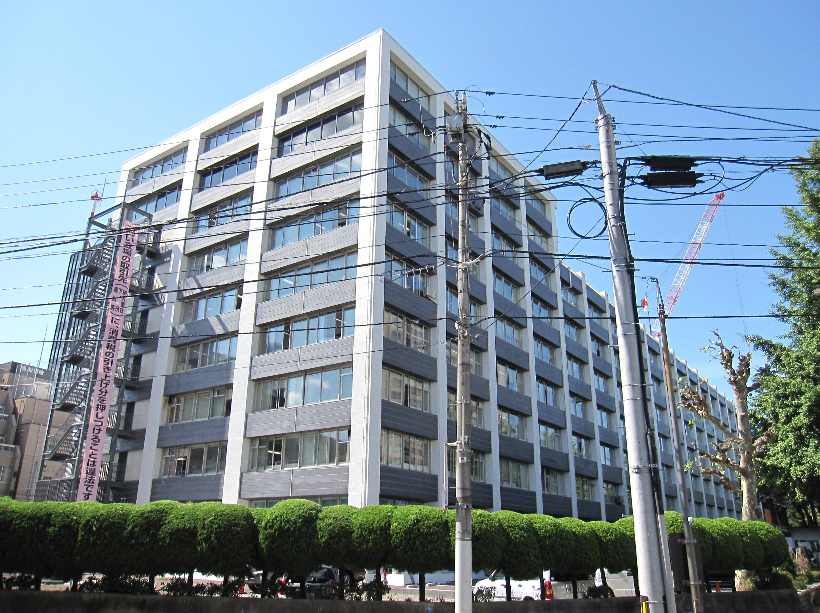 仙台合同庁舎。 入居官署 (内閣府) 警察庁 東北管区警察局(増築棟に入居) 財務省 東北財務局(増築棟に入居) 国税庁 仙台国税局 税務大学校仙台研修所 農林水産省 東北農政局 経済産業省 東北経済産業局(増築棟に入居) 国土交通省 東北地方整備局(増築棟に入居)